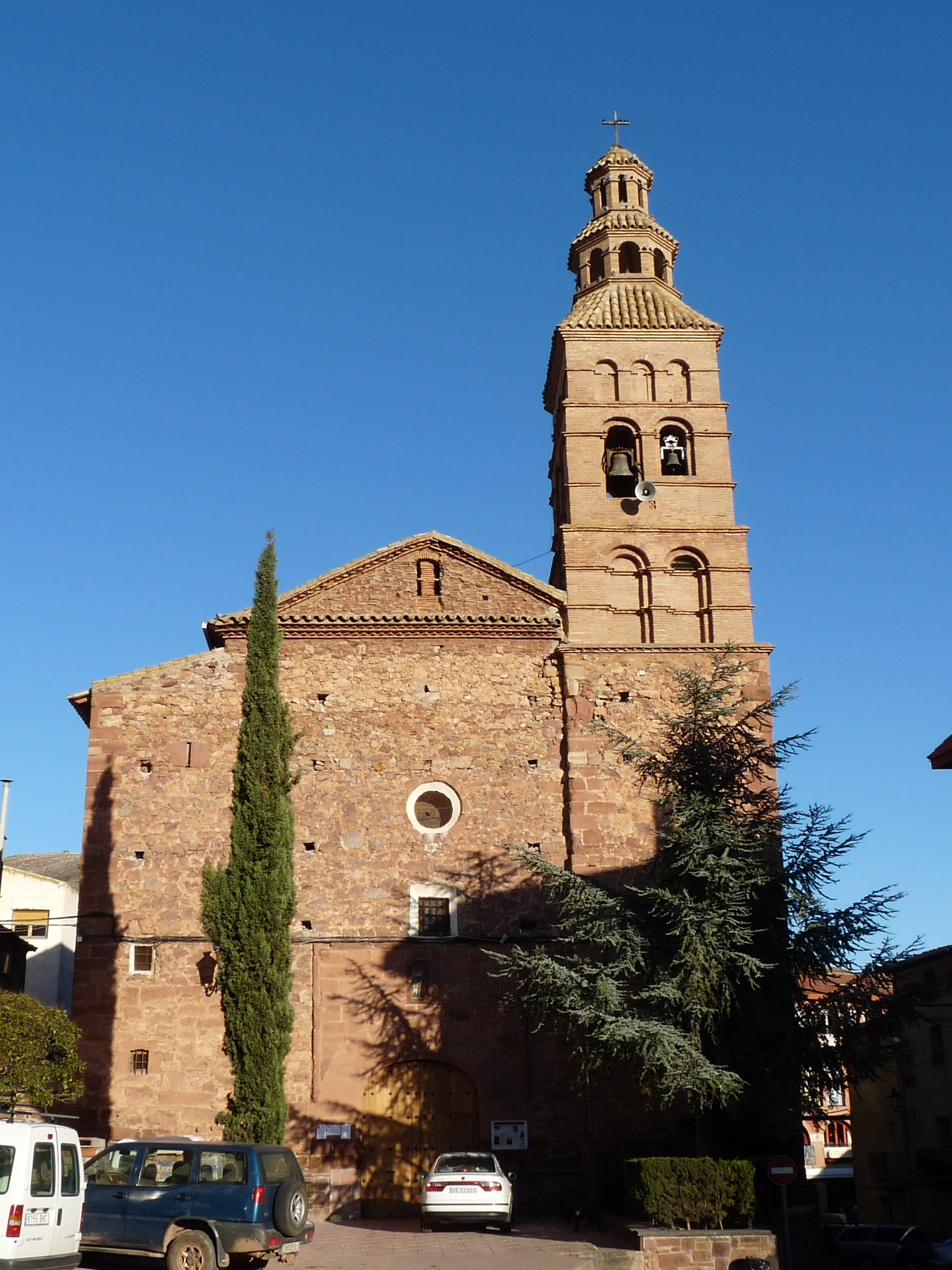 Brea de Aragón - Iglesia de Santa Ana s.XVI - Fachada